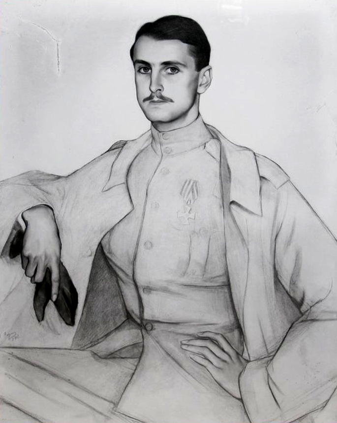 С. Сорин Портрет Сергея Оболенского 1917 рисунок